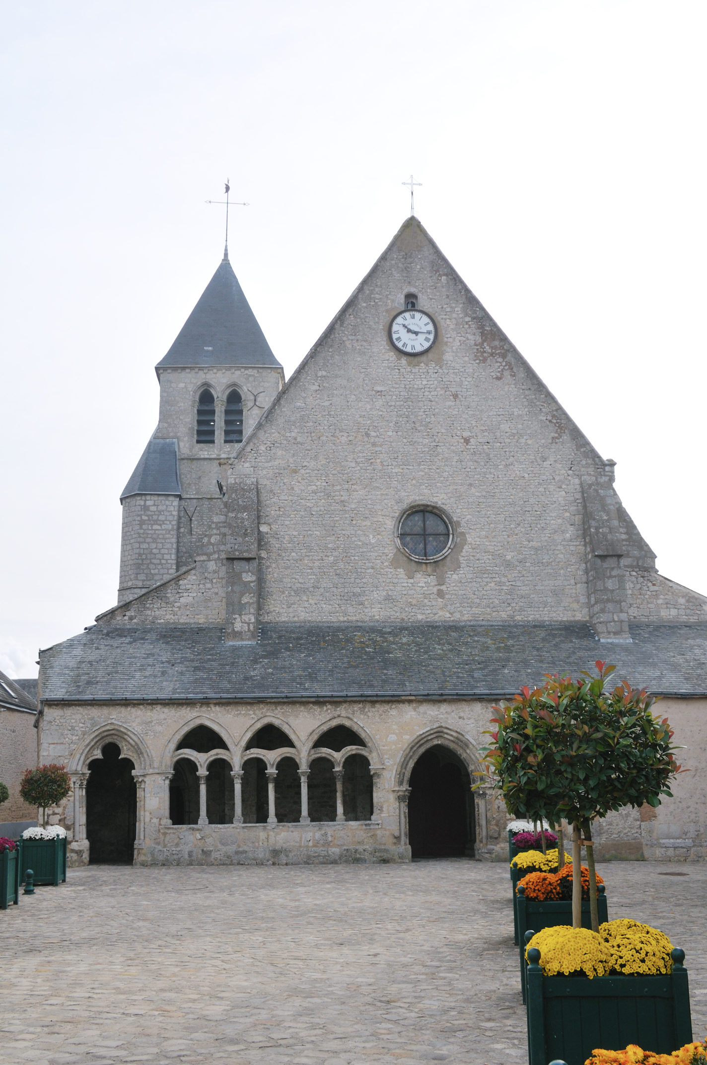 Église Saint-Denis, Toury, Eure-et-Loir, France